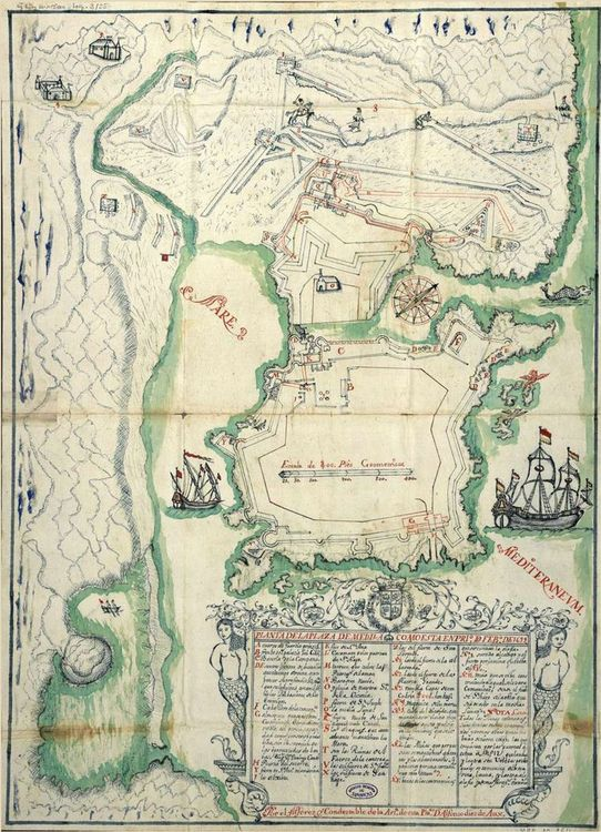 Plano de la Plaza de Melilla como está en principio de febrero de 1699. MPD-10-164, nº 8. Plans of Melilla